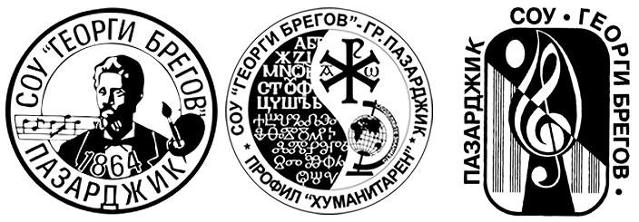 Вляво: първото лого на училището, 90-те години на XXв В средата: лого на профил „Хуманитарен“, 2006г Вдясно: настоящото лого на училището